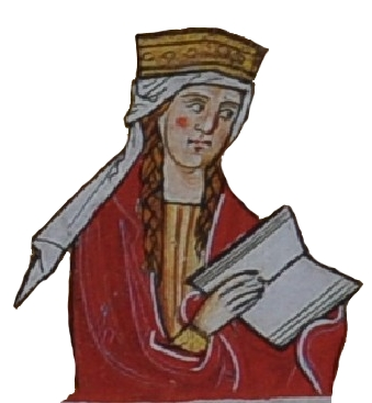 Konstancie Uherská